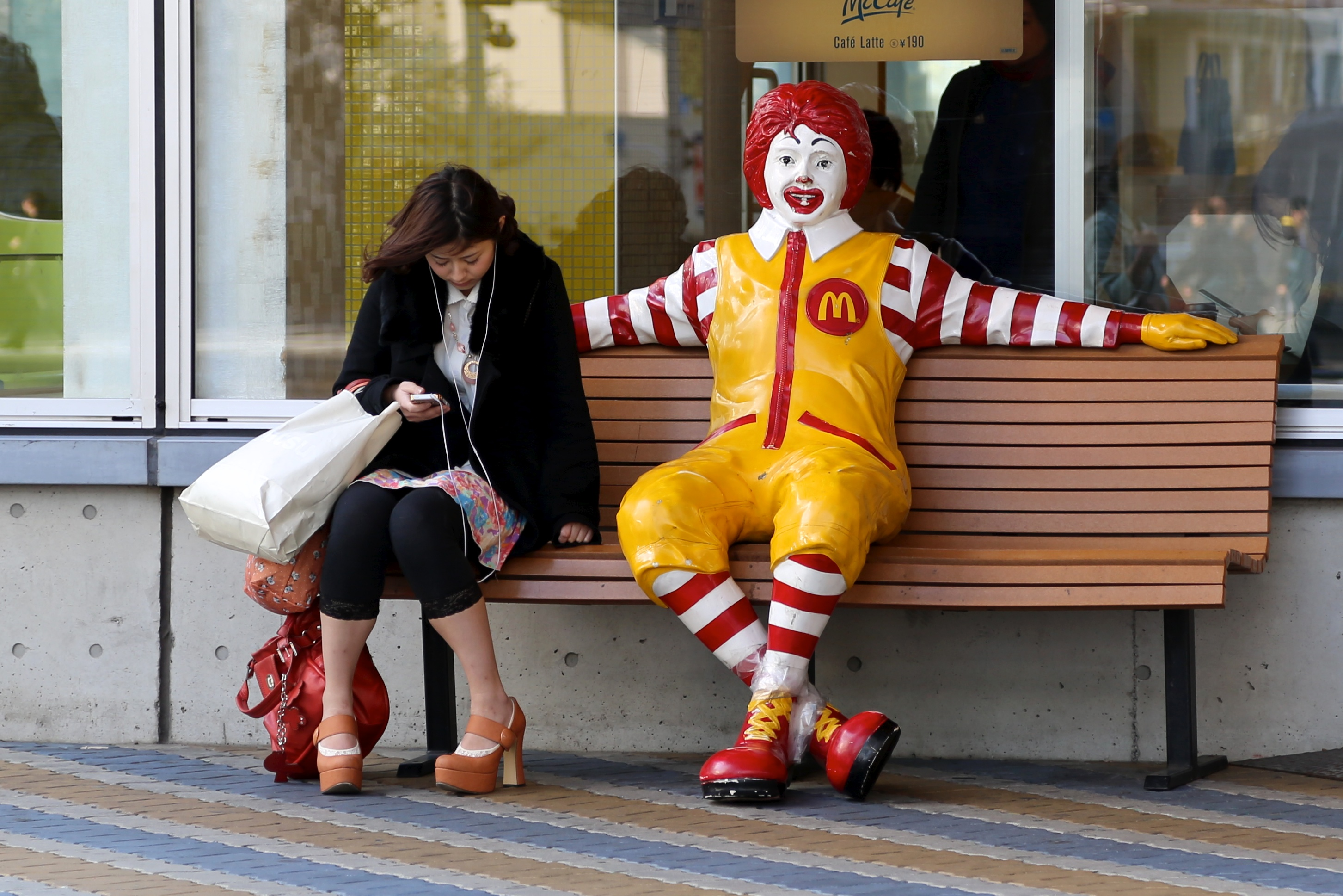 Momenti di odaiba 15-50-17